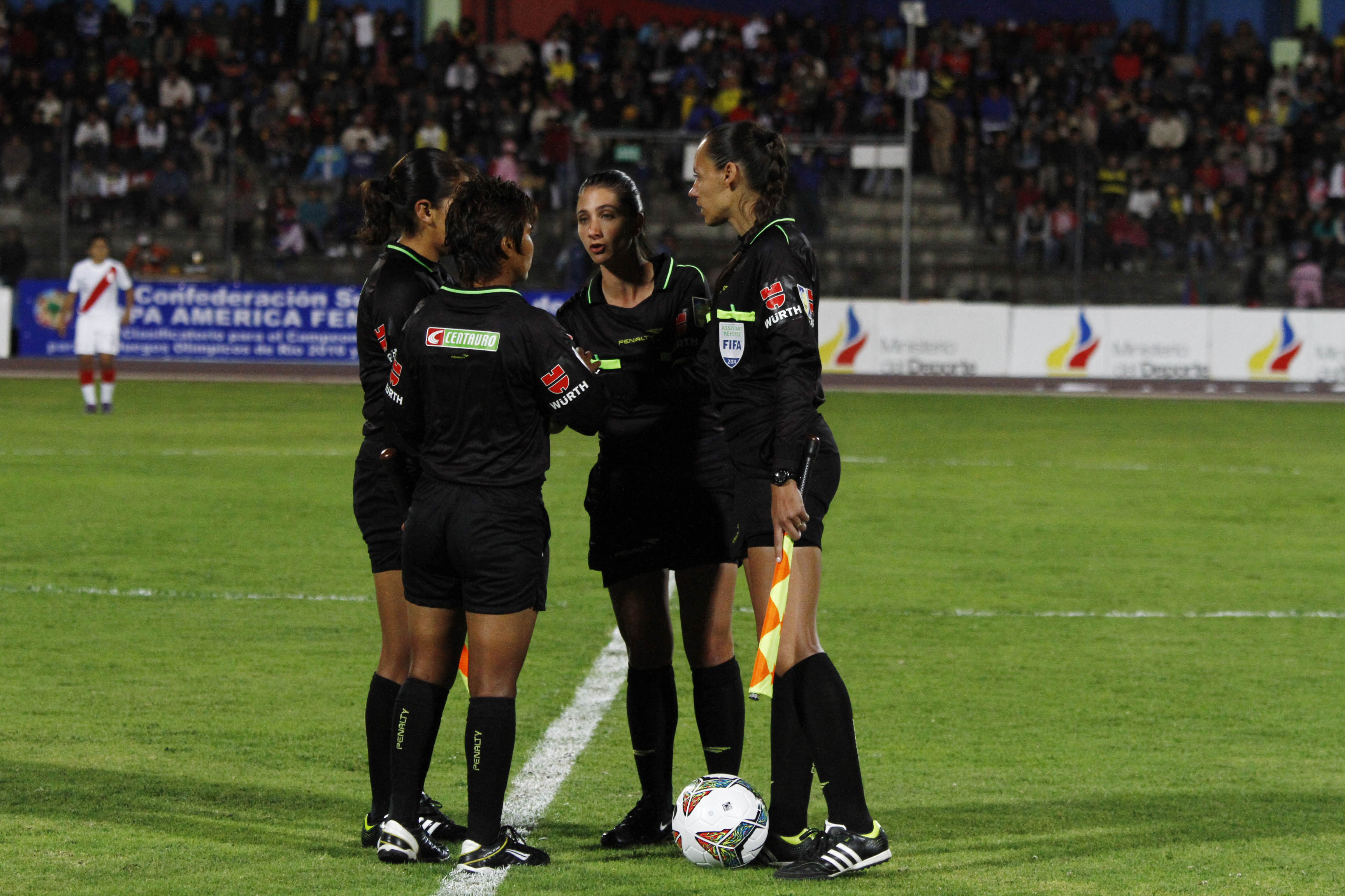 Riobamba (Chimborazo), 11 sep (Andes).- En el estadio Olimpico de la ciudad de Riobamba se jugó el primer partido de la selección ecuatoriana frente a la selección de Perúp en el campeonato Copa América Femenina de Fútbol Ecuador 2014. Foto: Micaela Ayala V./Andes